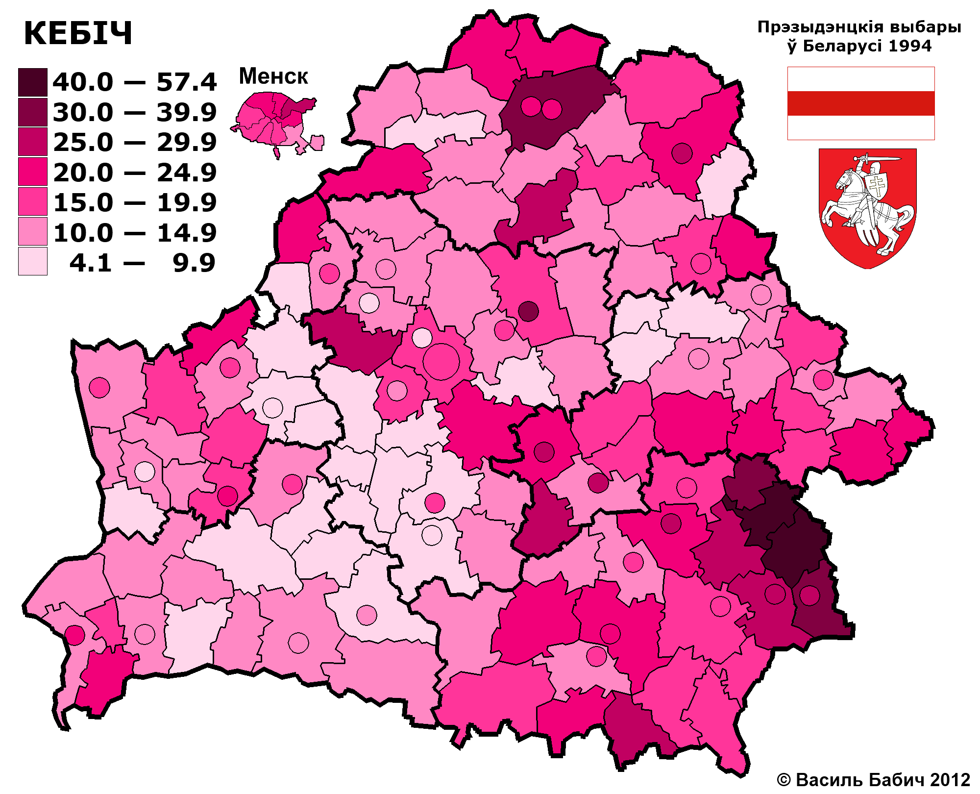 Беларуская (тарашкевіца): Выбары прэзыдэнта Беларусі 1994 року. Першы тур. Вячаслаў Кебіч.